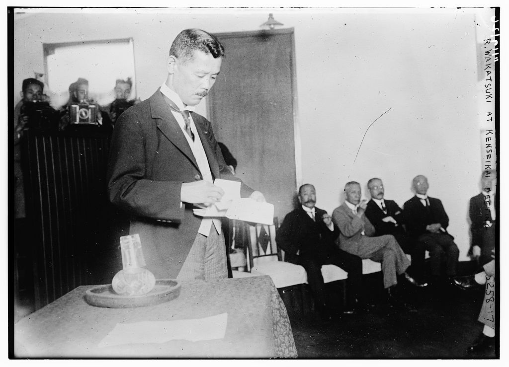 Reijiro Wakatsuki at meeting of Kensei-Kai.